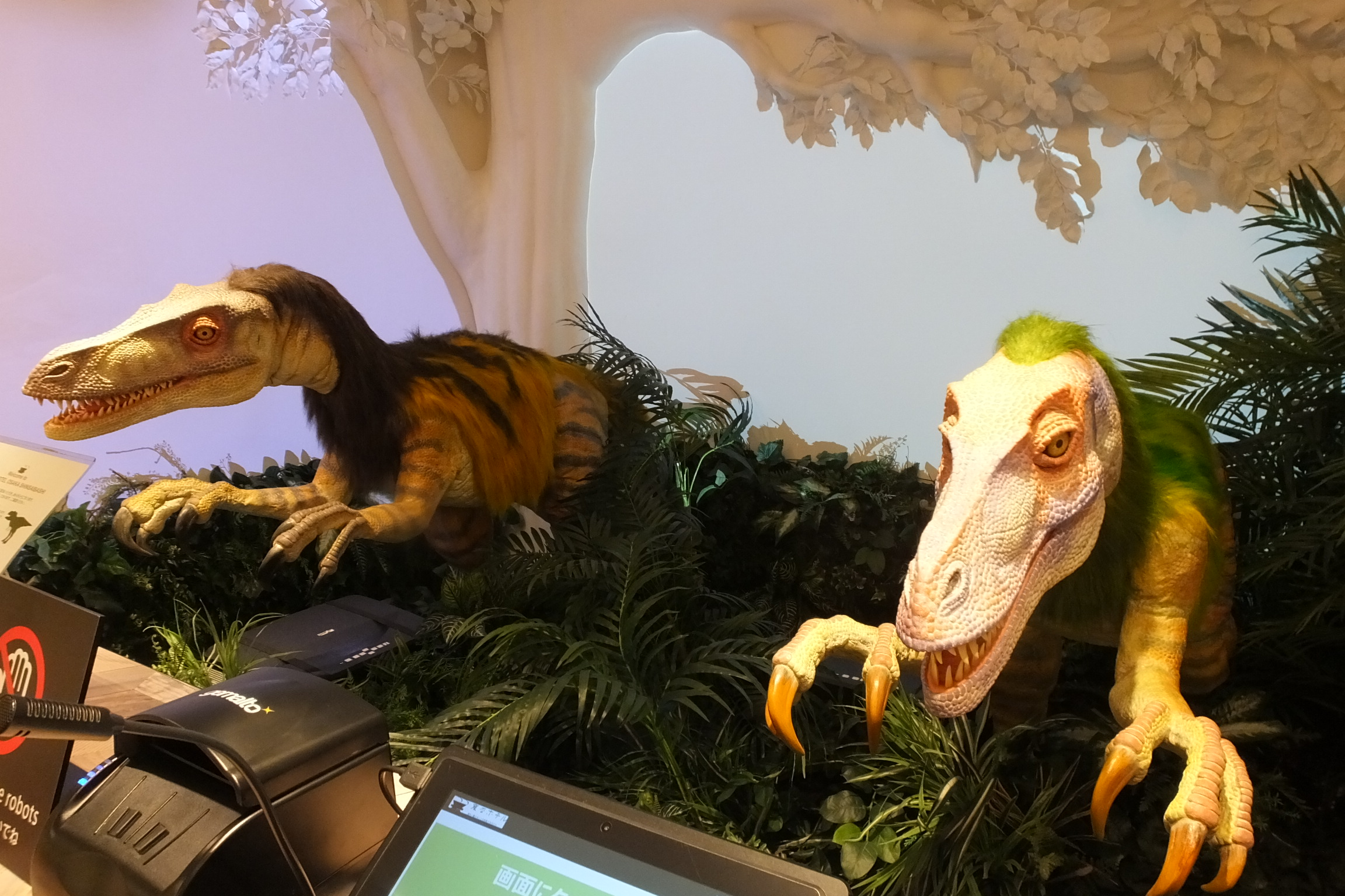 2019-08-06 Henn na Hotel,Osaka-Shinsaibashi (変なホテル大阪心斎橋) 大阪府大阪市中央区南船場３丁目５－２ アクセス 御堂筋線「心斎橋駅」2番出口直結「クリスタ長堀」内、北7番出口を出てすぐ